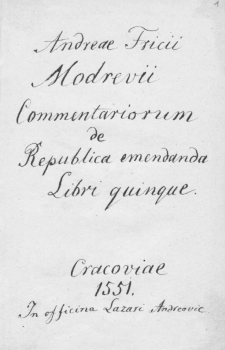 Frycza Modrzewskiego De Repiblica Emendanda - Biblioteka Narodowa w Warszawie, jedyny egzemplarz, zastępcza strona tytułowa